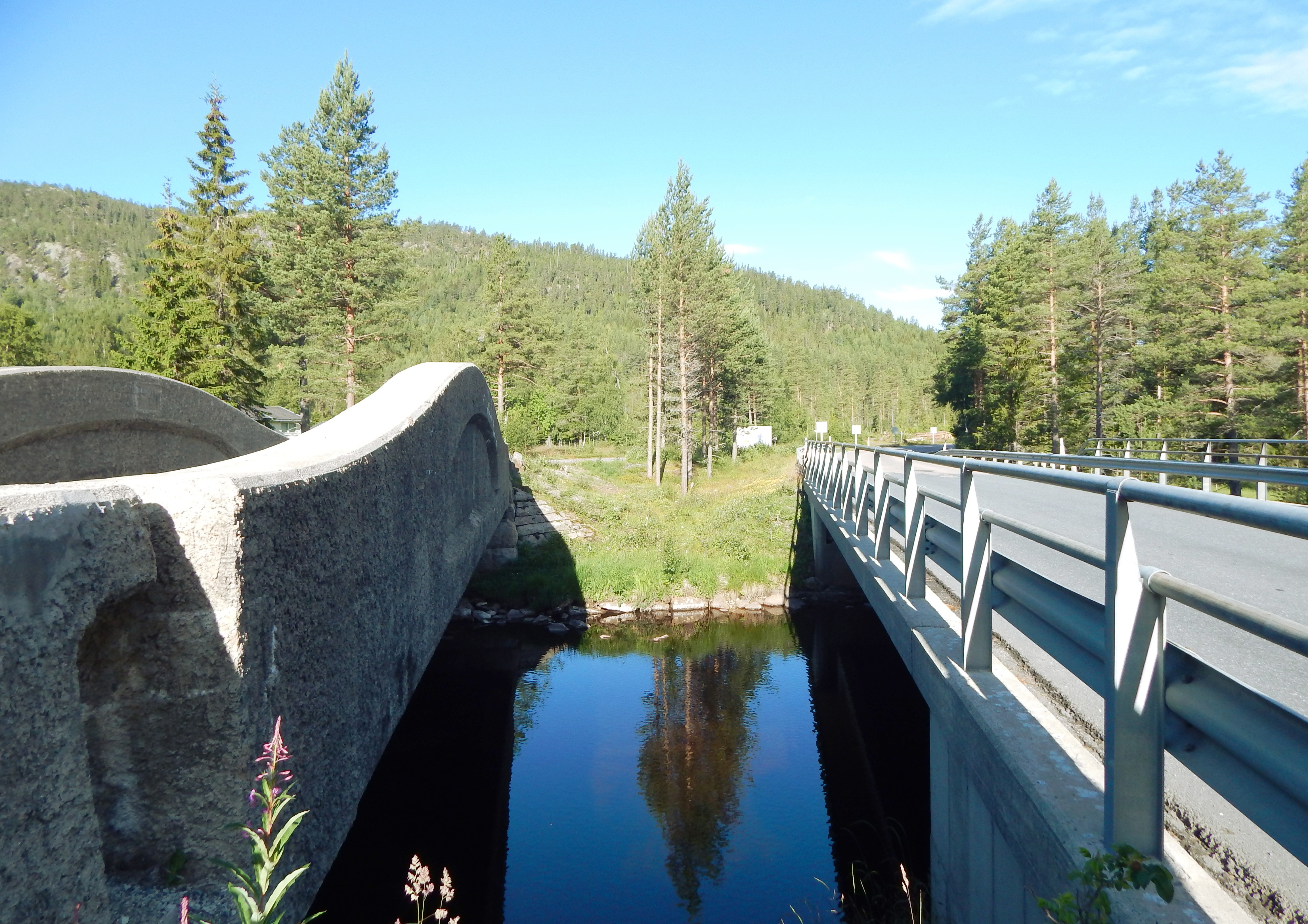 Løka nye og gamle bru, med fylkesvei 37 på sistnevnte